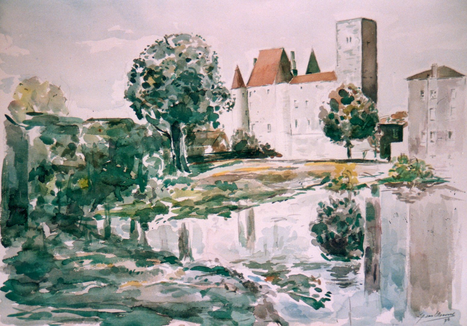 Le château de Nemours au bord du Loing, aquarelle de 1975 (46 cm sur 61 cm) par Léon van Dievoet (1907-1993), architecte, peintre, graveur et aquarelliste